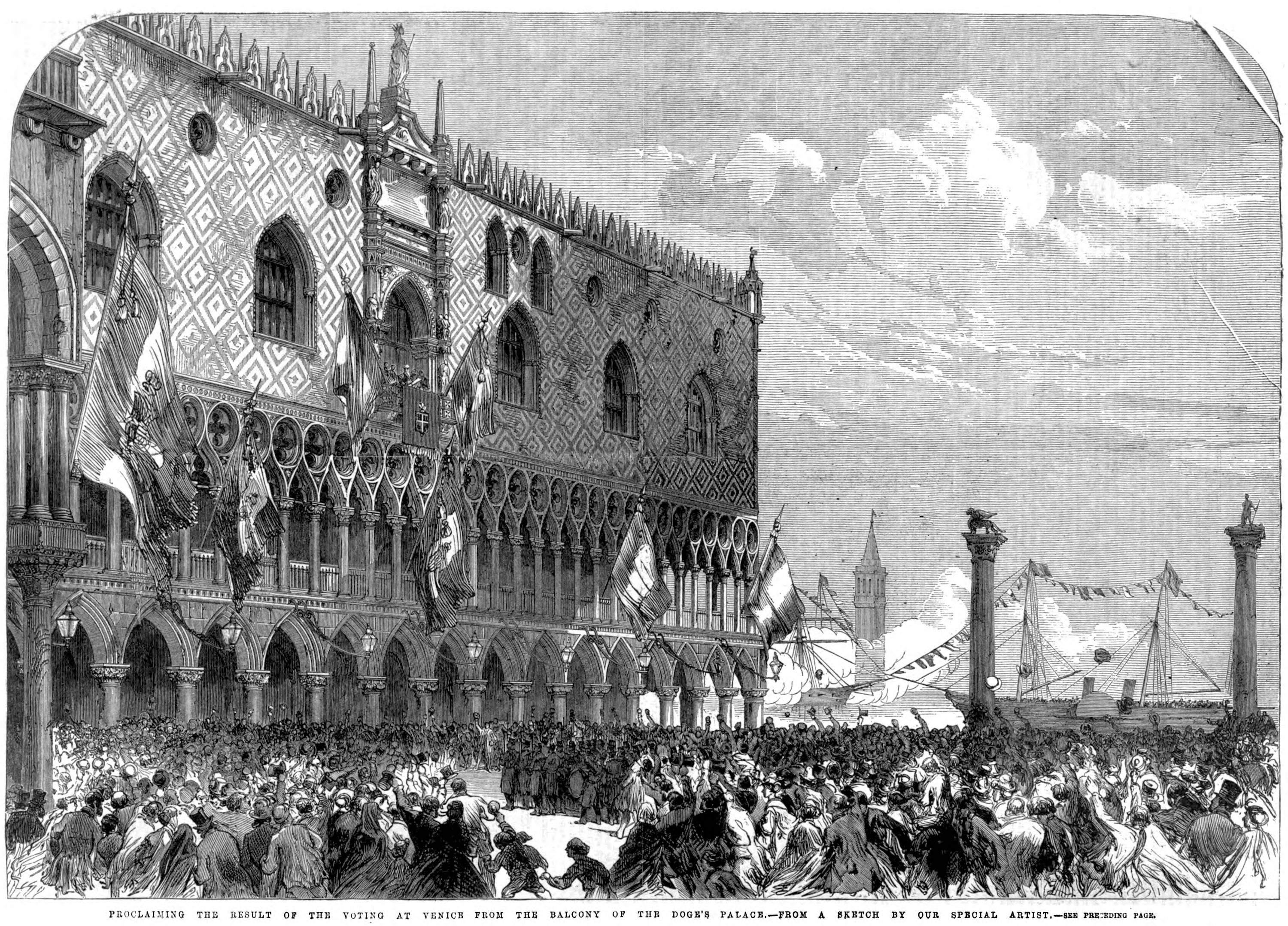 Sebastiano Tecchio proclama il risultato del plebiscito dal balcone di Palazzo Ducale, 27 ottobre 1866